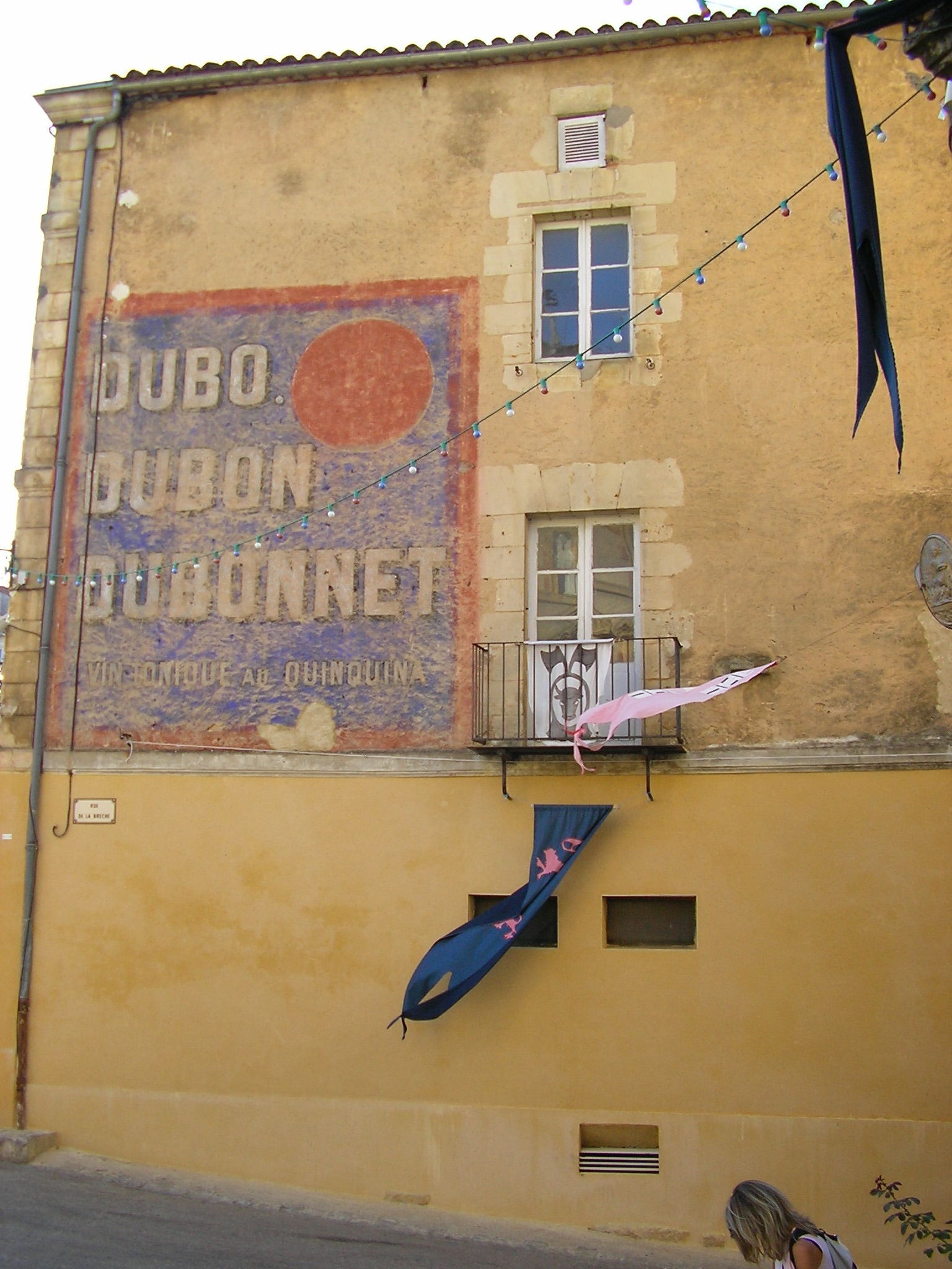 Vecchia insegna su un muro di Belves